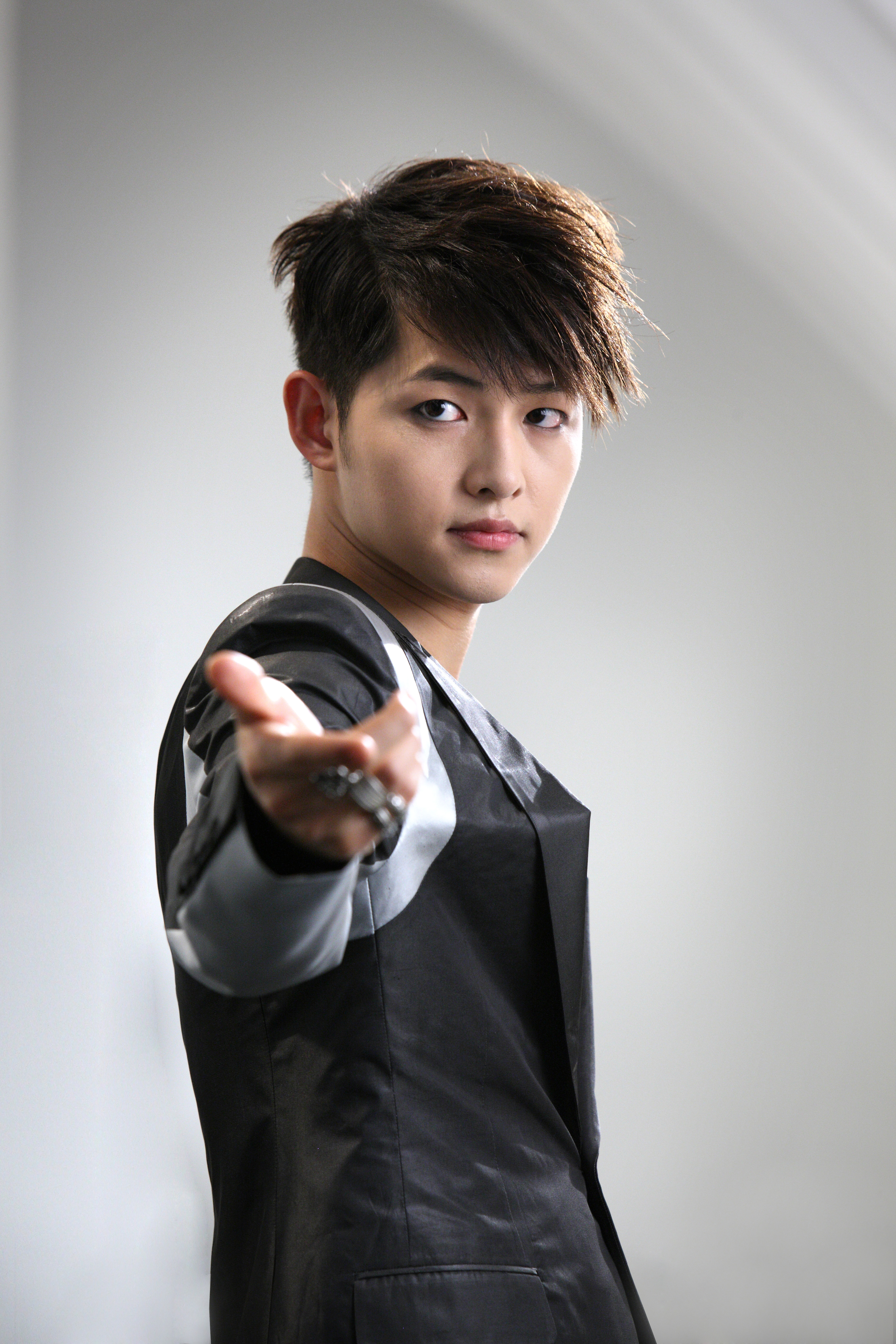 블레이드 절대슬림이란 이런것! 얇고 강한 Lg xnote로 앞서가라!